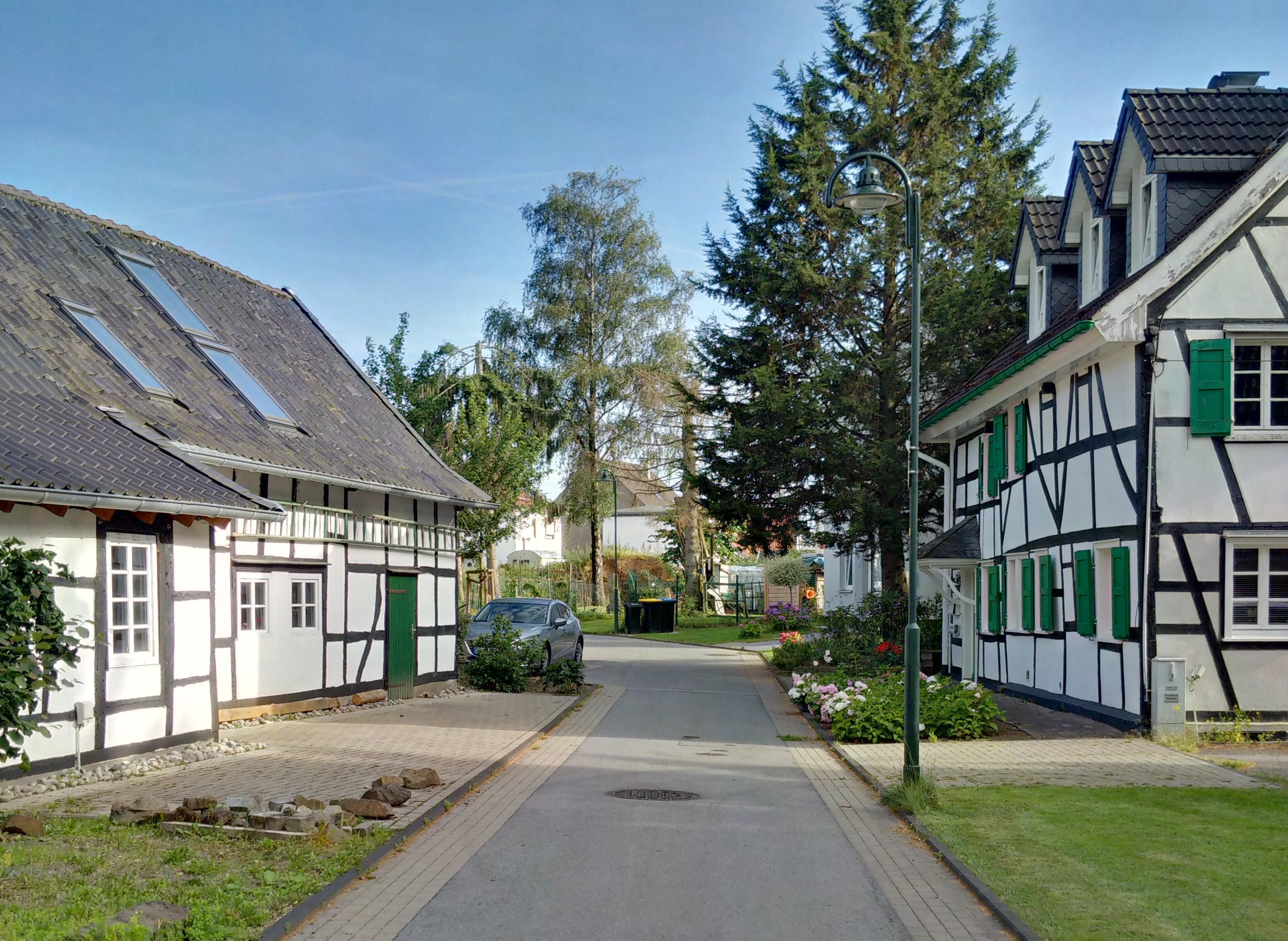 Verbliebene Fachwerkhäuser in der Hofschaft Siebels in Solingen-Aufderhöhe